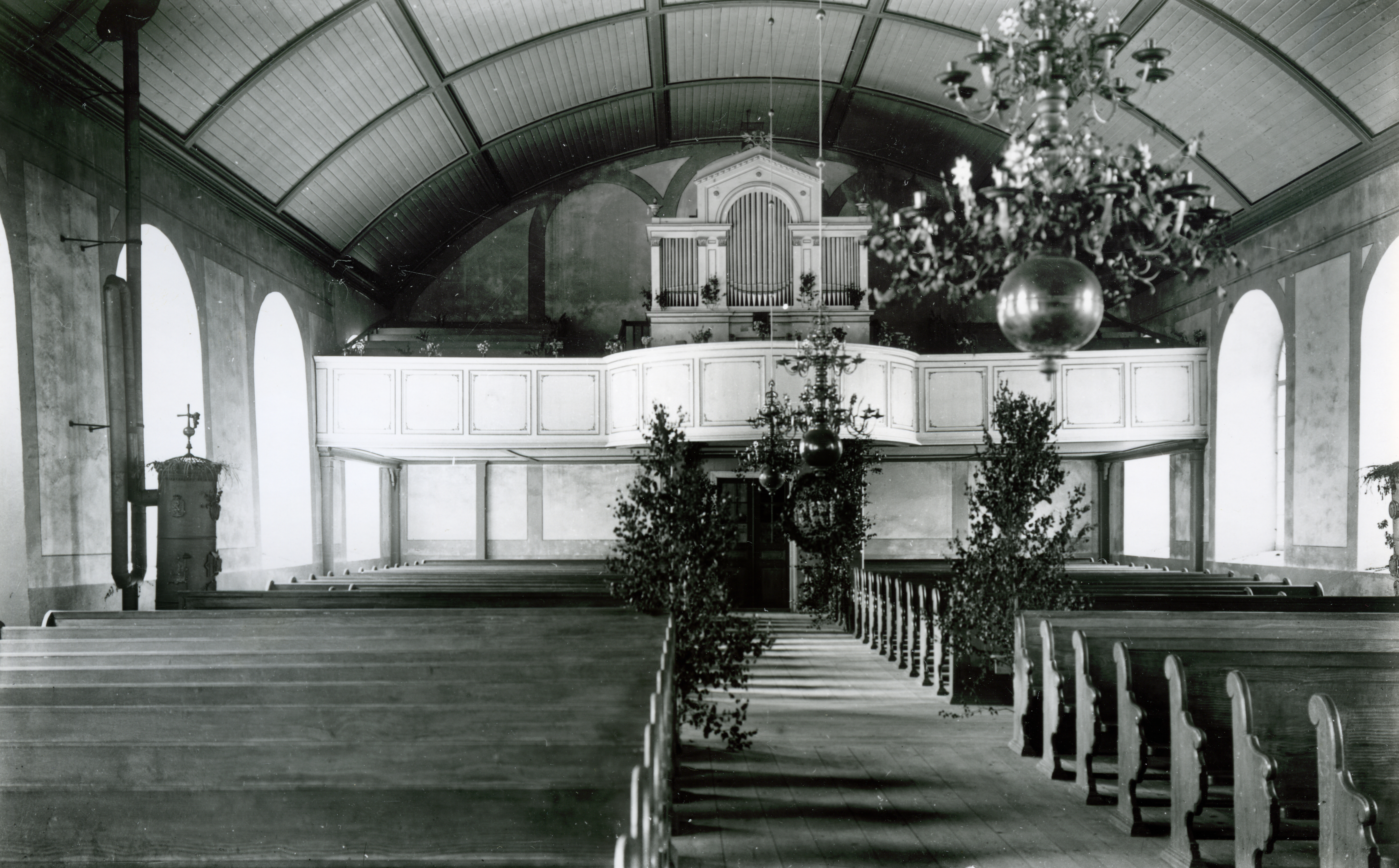 Interiör av Floby kyrka, Vilske härad, numer Falköpings kommun, Västergötland, Sverige. Fotot taget av Gustav Johansson på Veken år 1919. På bilden ses orgelläktaren och till vänster järnkaminen. Skannat och retuscherat av Gunnar Creutz.